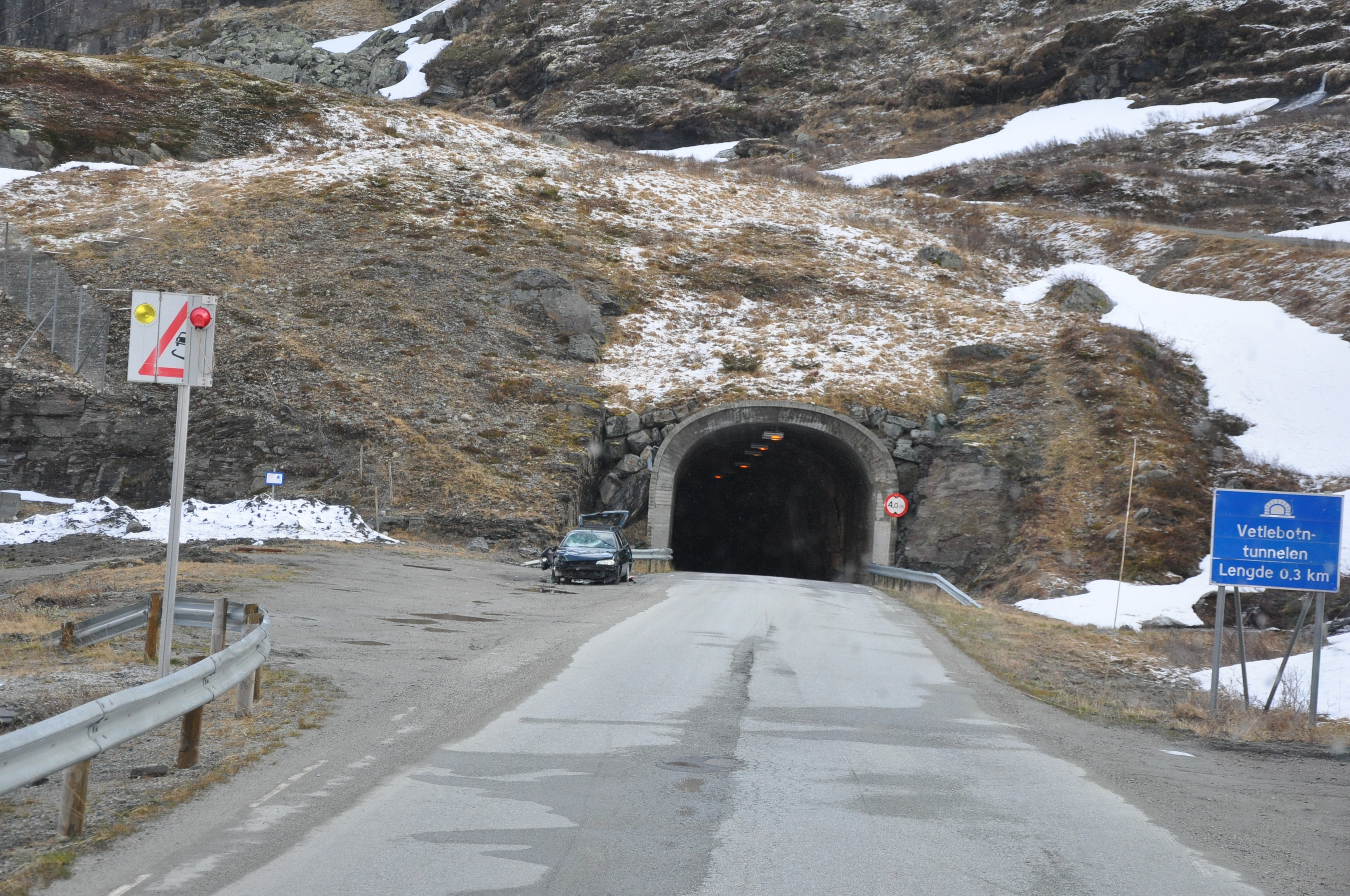 Austre innkøyring Vetlebotntunnelen på Riksveg 50